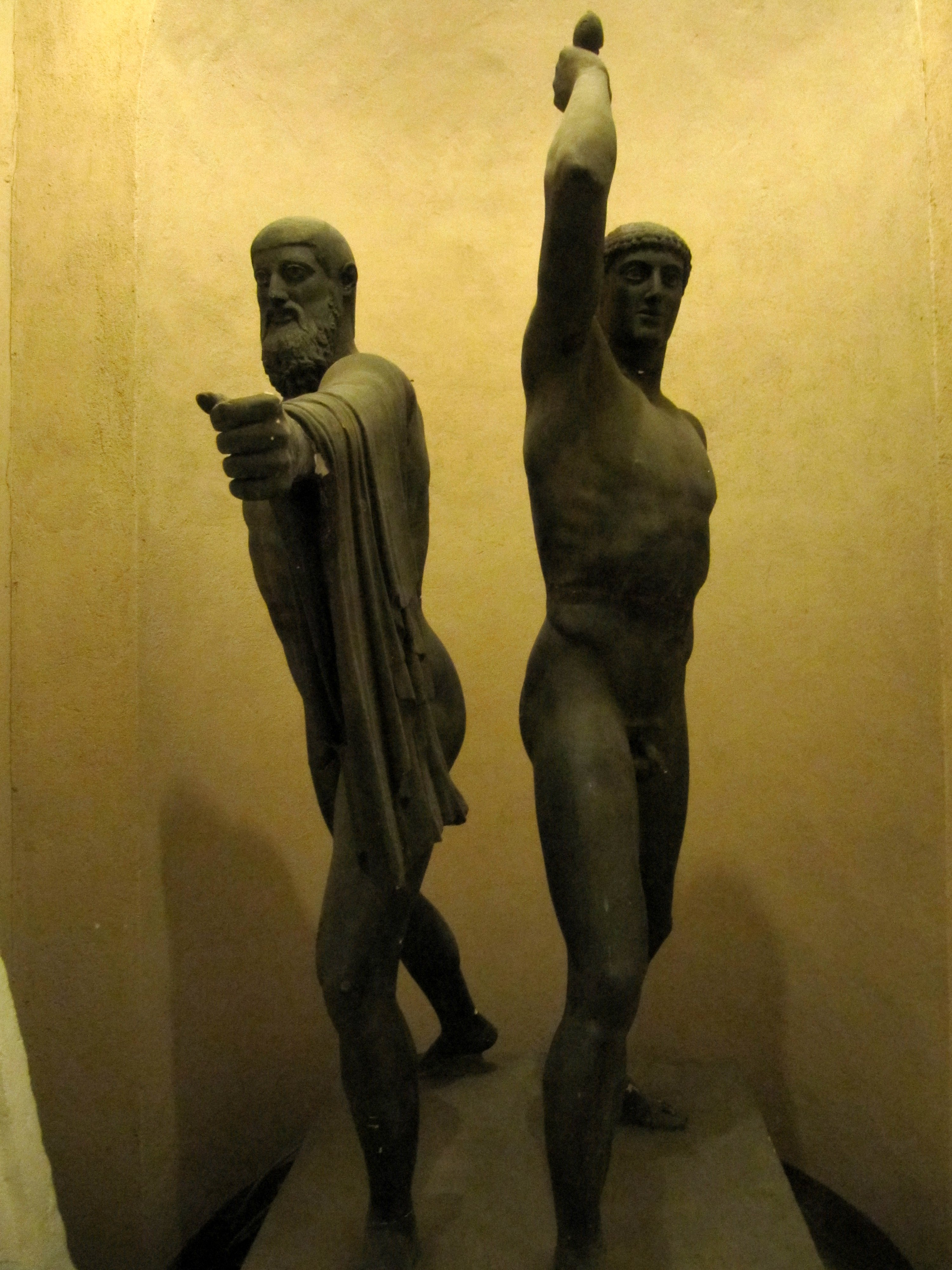 Musée des moulages